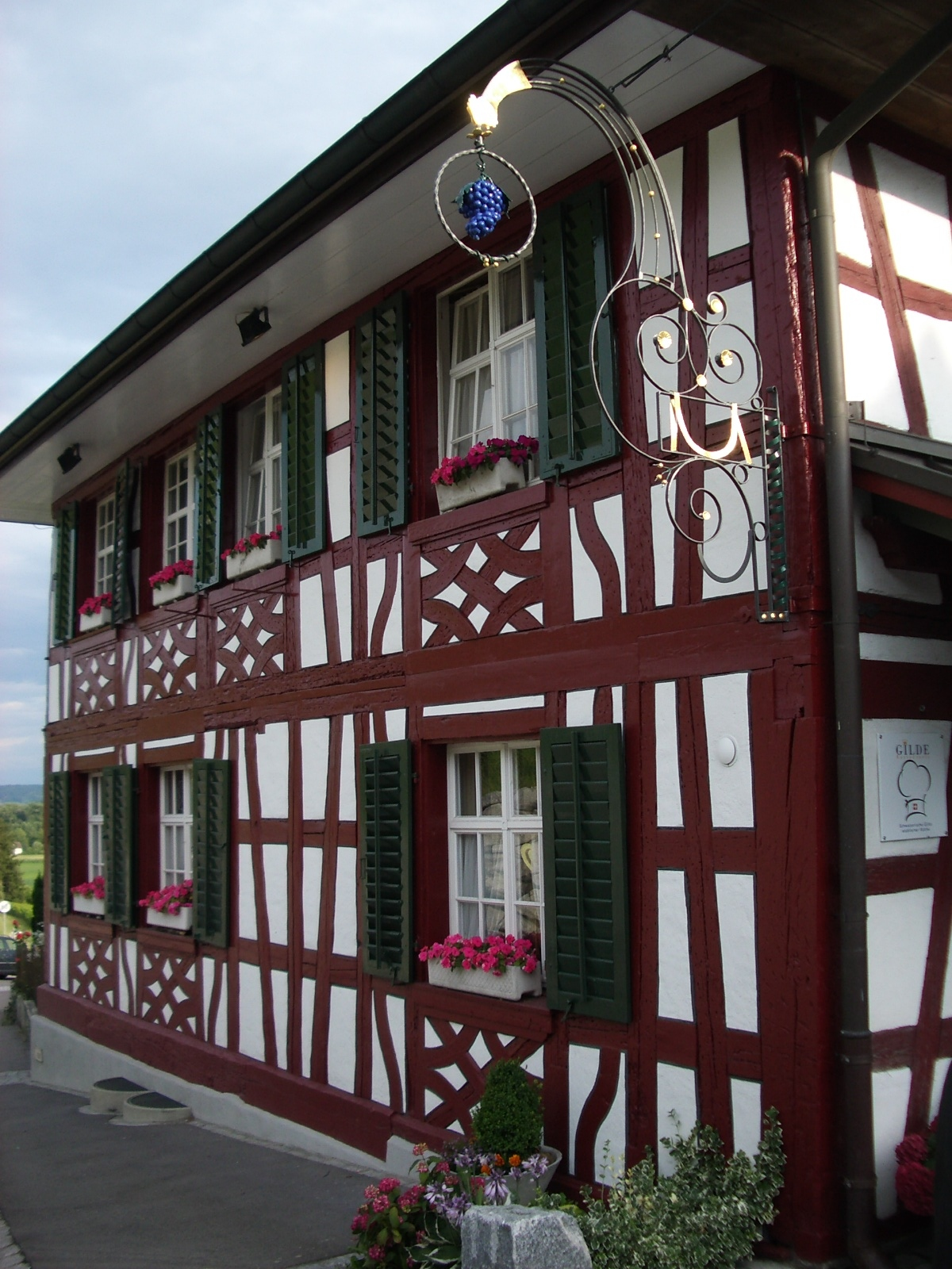 Dietingen TG, Switzerland